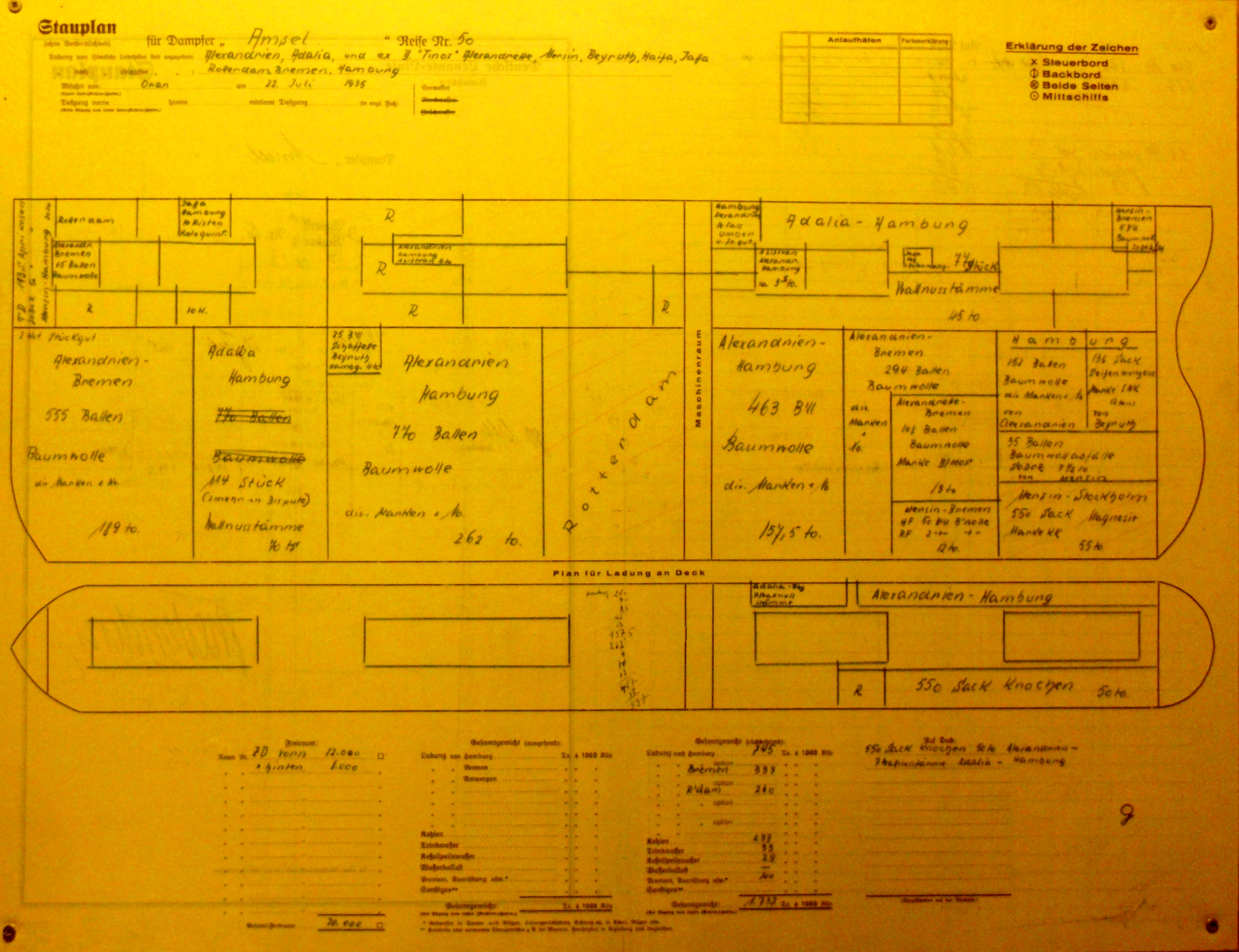 Stauplan